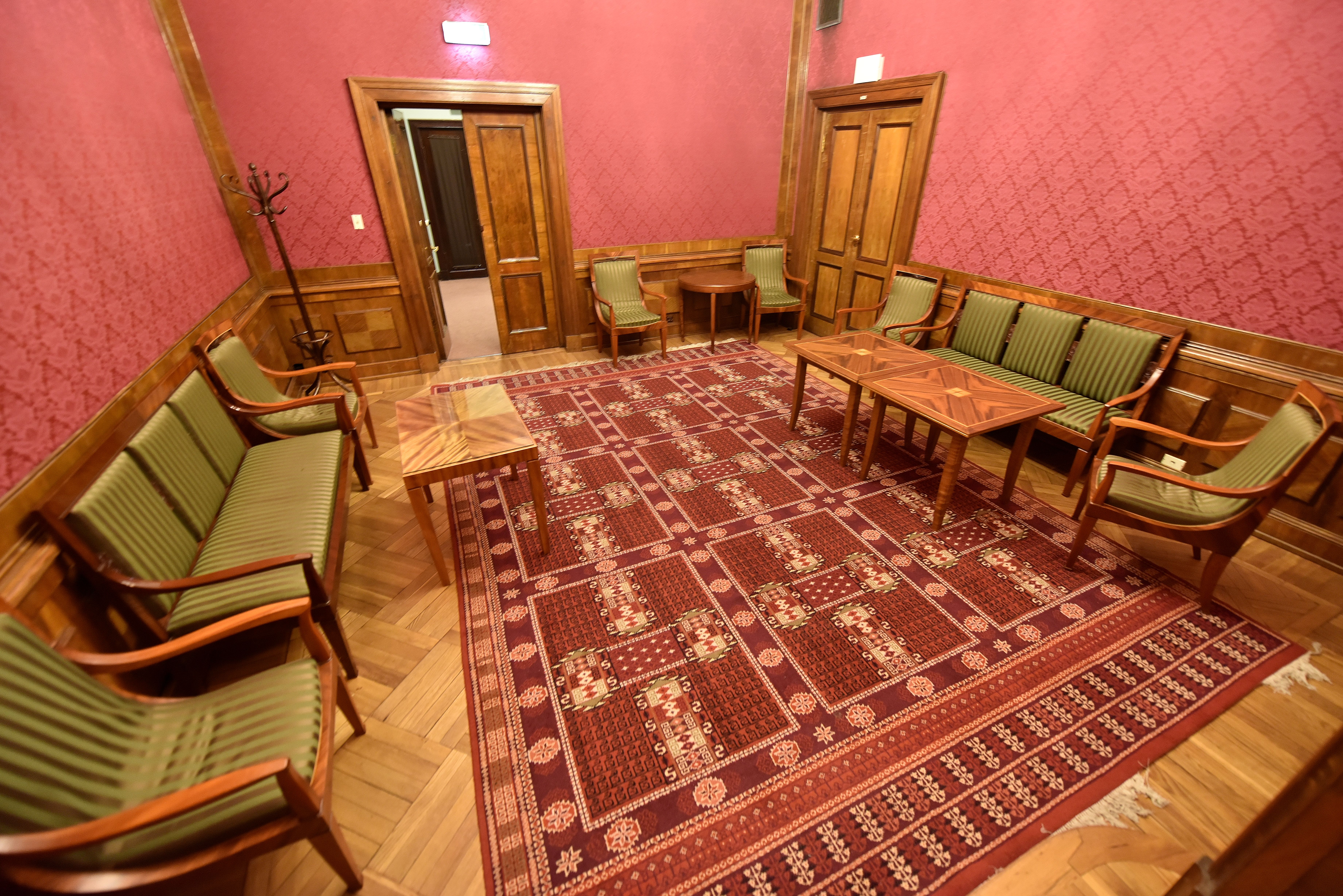 Sala nr 245 na zapleczu Sali Kongresowej w Pałacu Kultury i Nauki w Warszawie